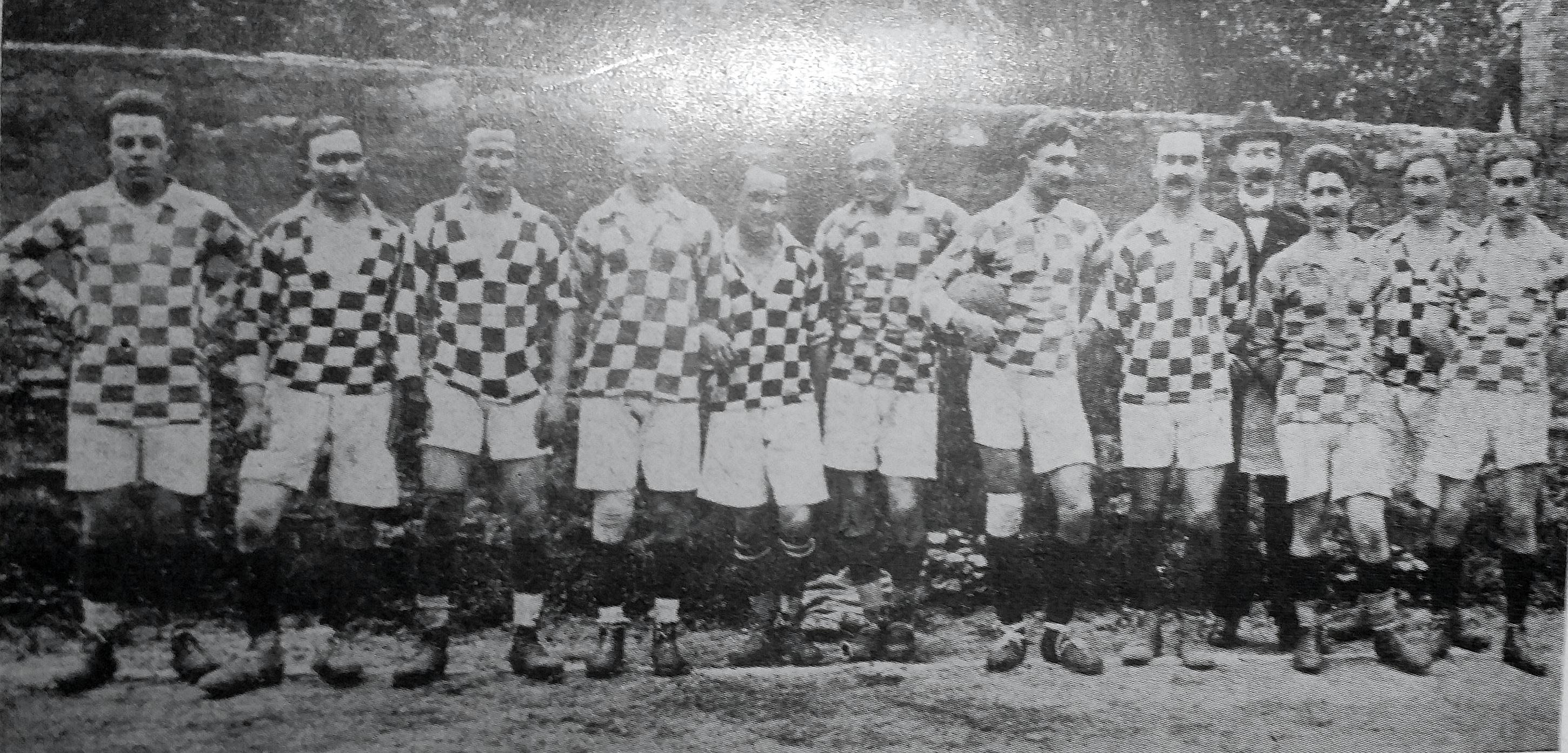 Equipe du FC Lyon avant la finale de la Coupe de France 1918. De gauche à droite : Allemand, Meunier, Soulignac, Bellon, Salmson, Bard, P. Weber, A. Weber, Tronchon (président), Ebrard, Richier, Orvain.